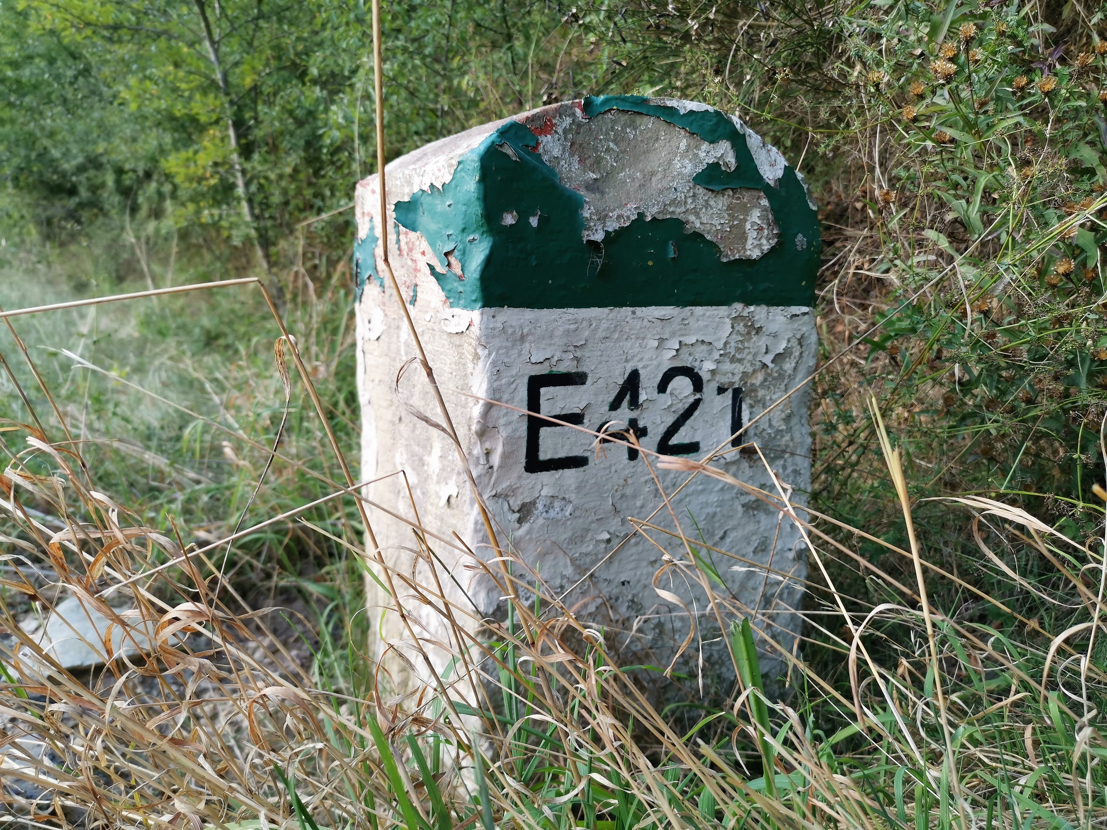 Borne kilométrique E421 à Marnach.